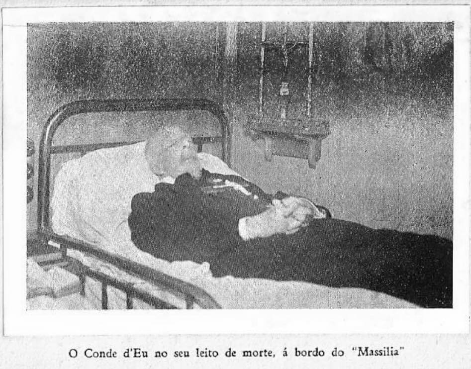 Fotografia do Conde D'Eu no seu leito de morte a bordo do "Massilia".